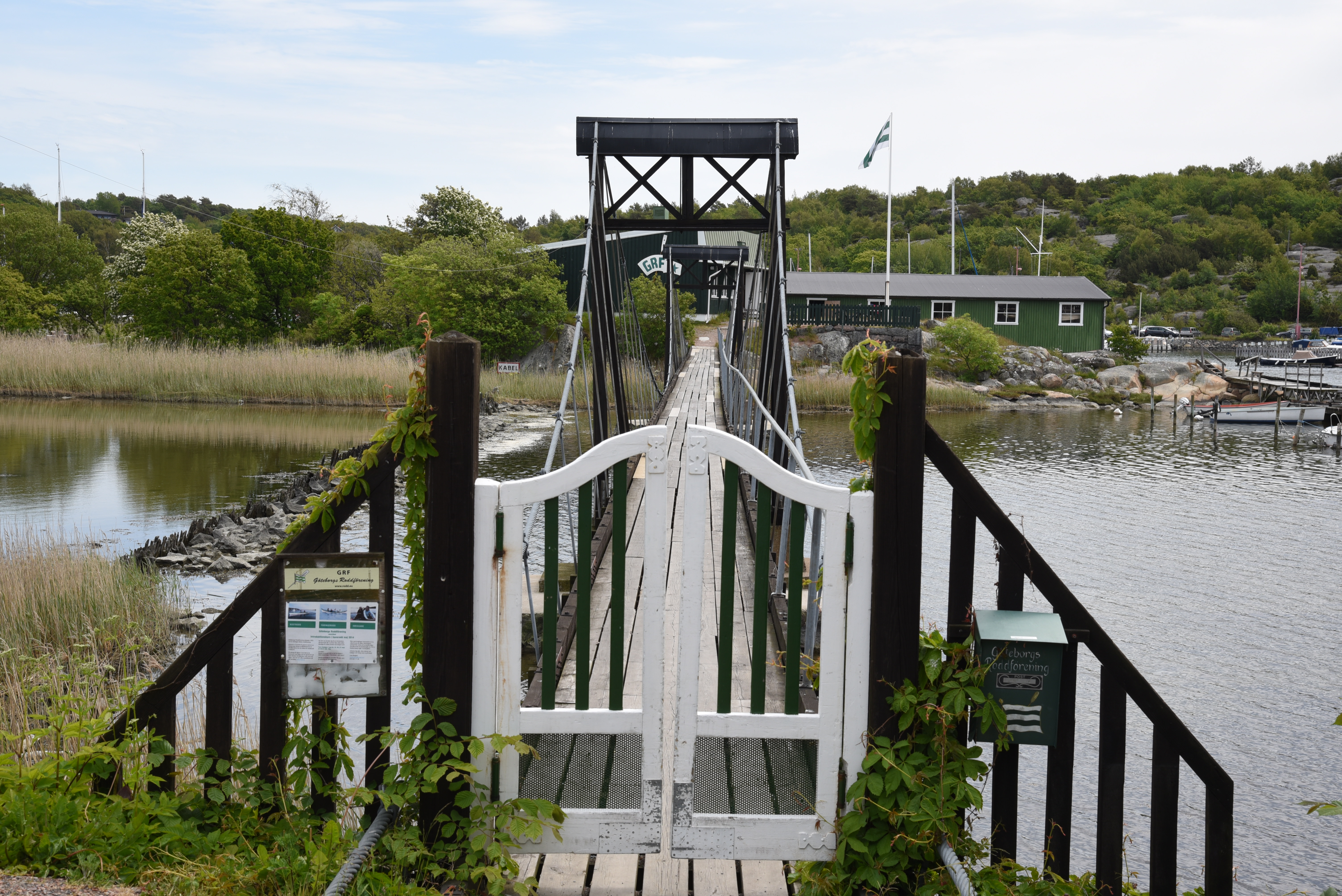 Hängbron över till till Göteborgs Roddförening på ön Saltskär vid Saltholmen i stadsdelen Älvsborg i Göteborg.